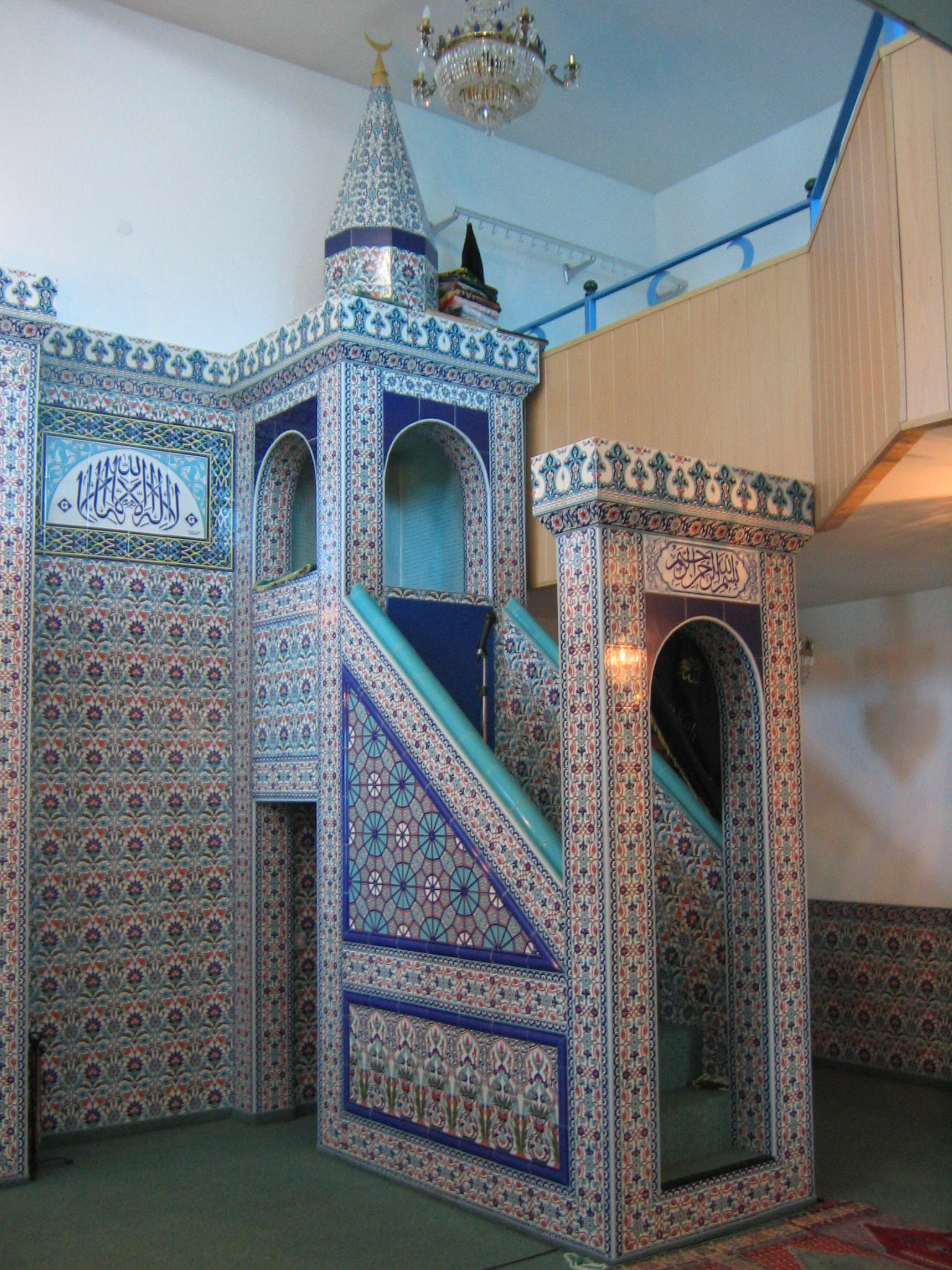 In der Moschee des Verbands Islamischer Kulturzent - Emmendingen